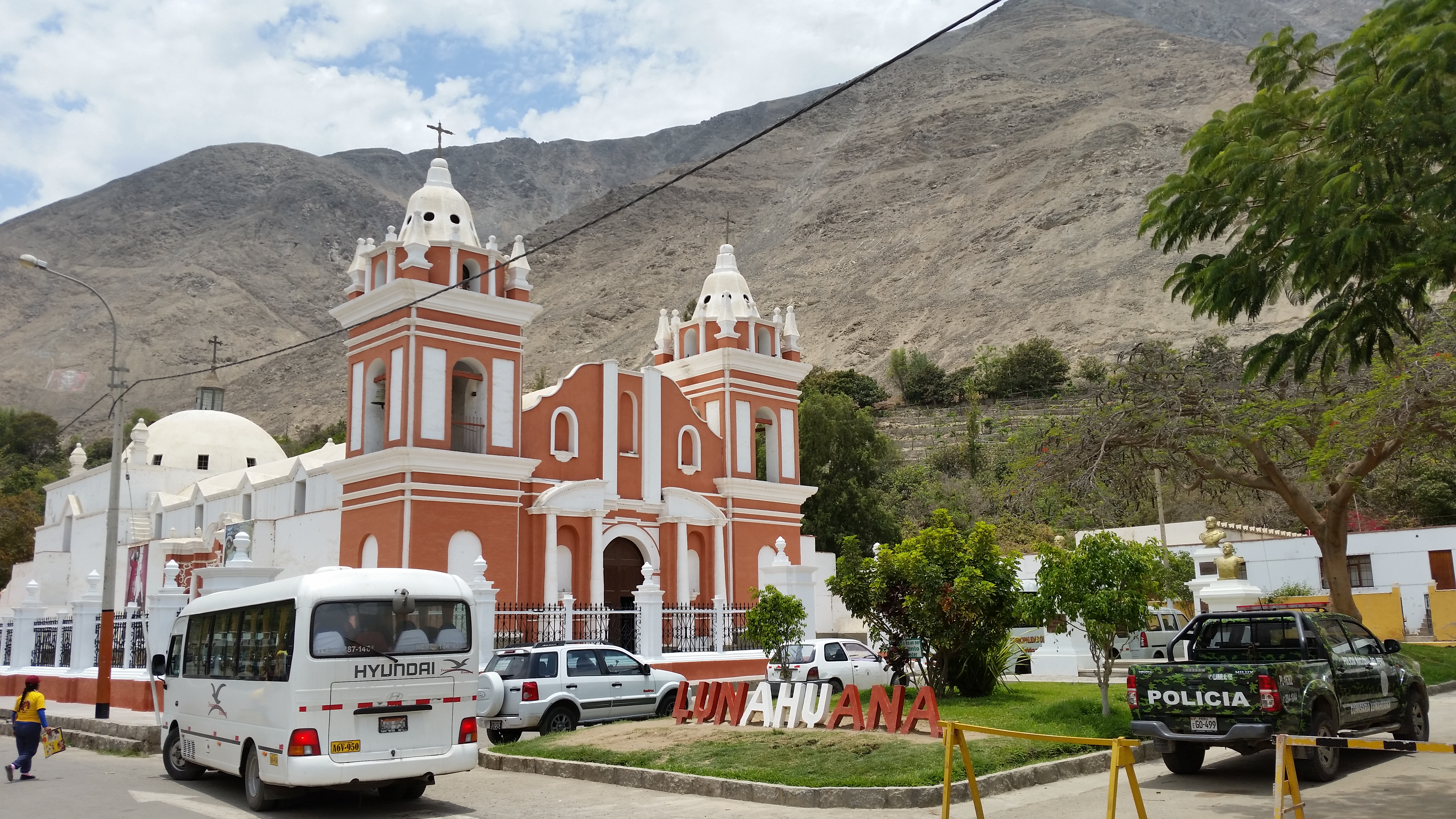 Iglesia de Lunahuana